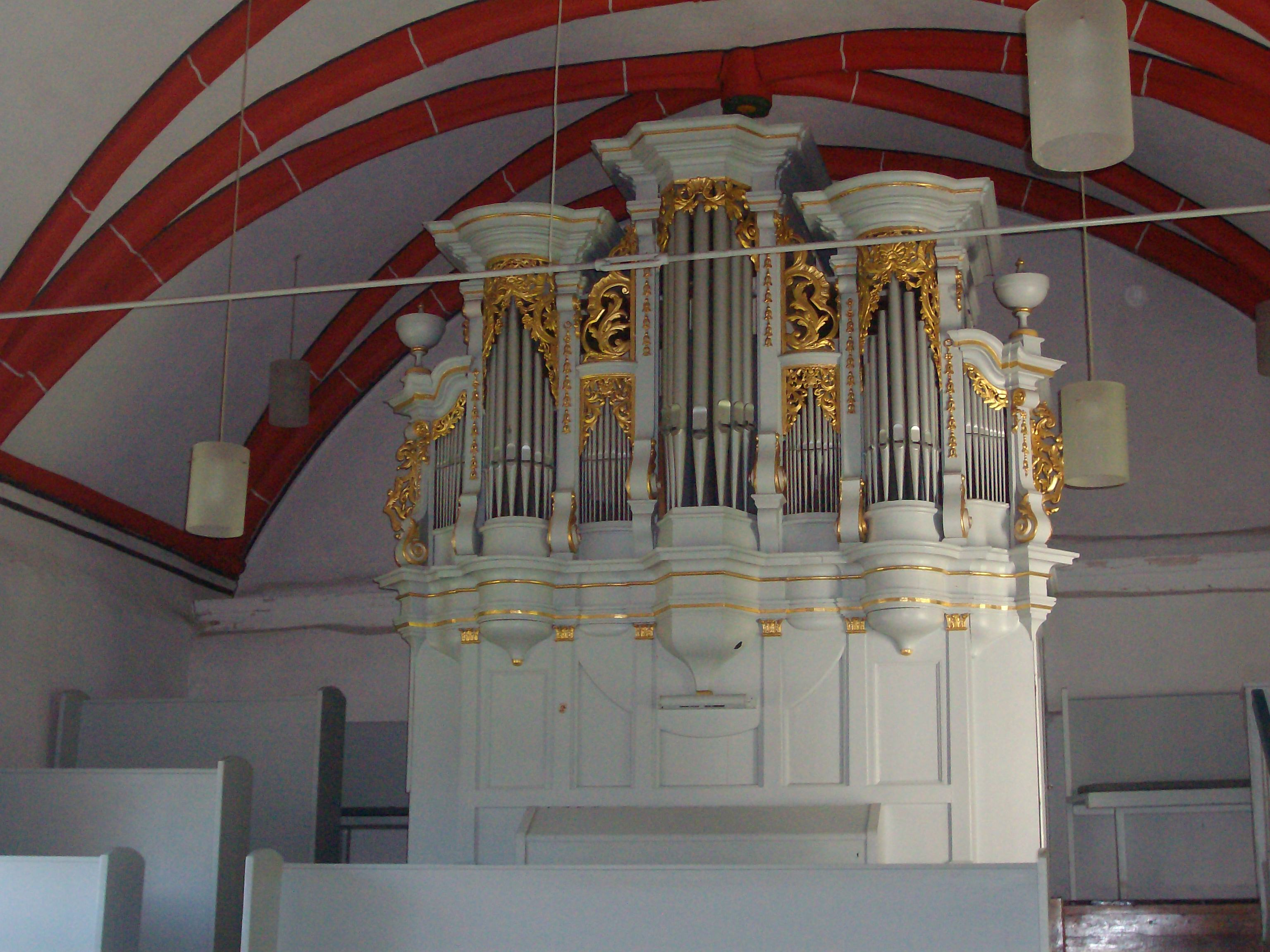 Orgel der Evangelischen Kirche Gonterskirchen, Laubach, Landkreis Gießen, Hessen, Deutschland